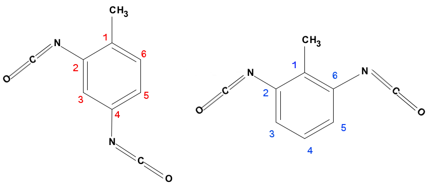 Estructura química de los isómeros 2,4-TDI y 2,6-TDI